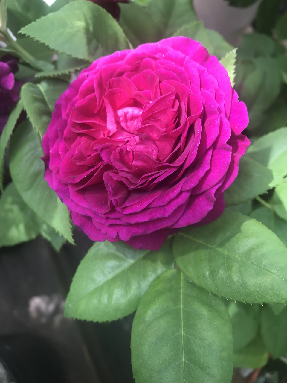 Rose 'Purple Lodge' ou 'Palais Biron'(Orard, 2007).